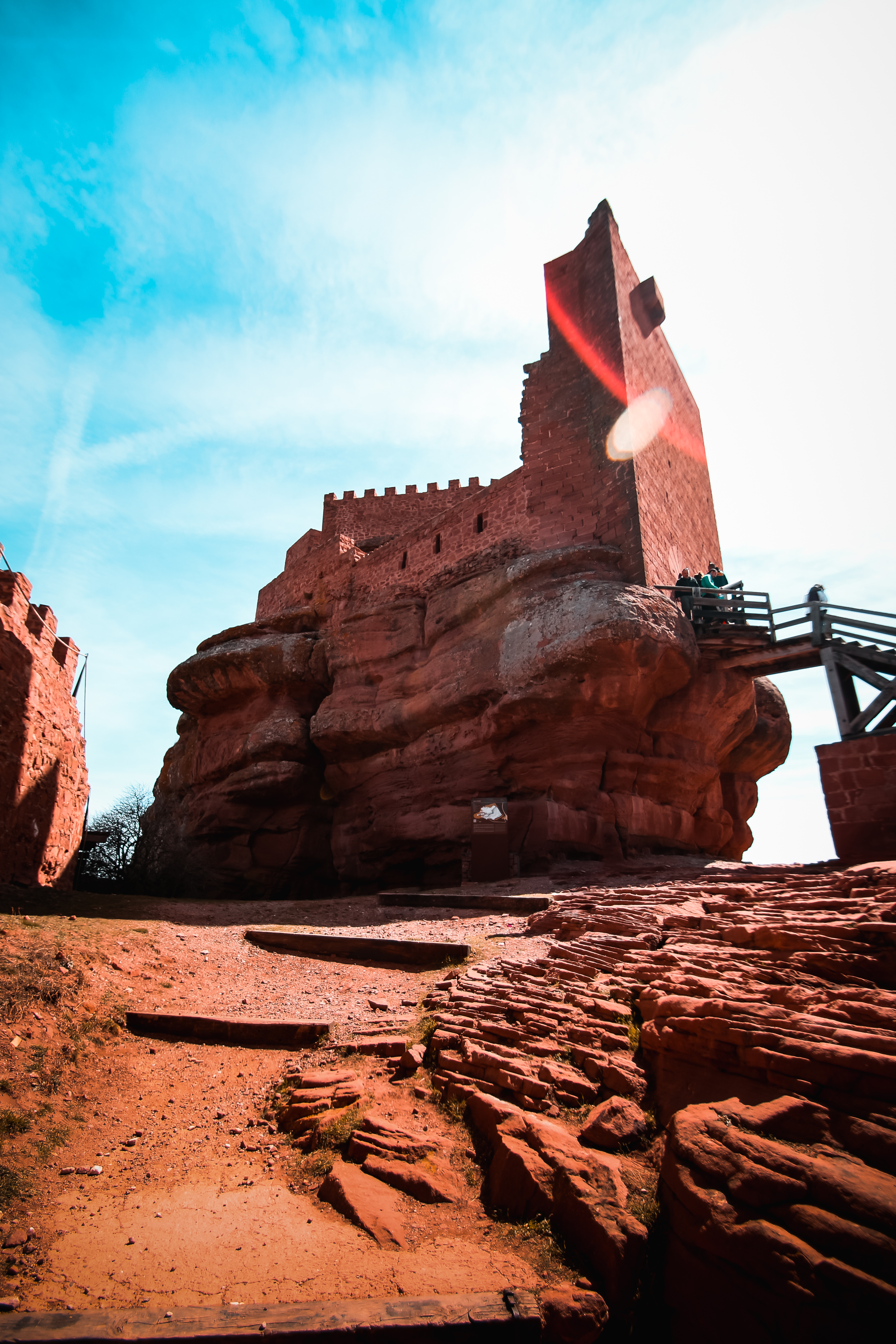 Torre del Castillo de Peracense